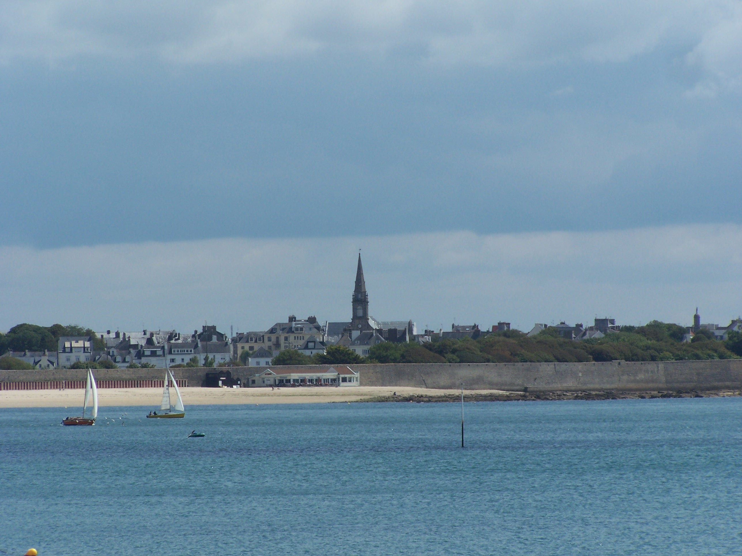 Port-Louis vu depuis Larmor-Plage dans le Morbihan en France.